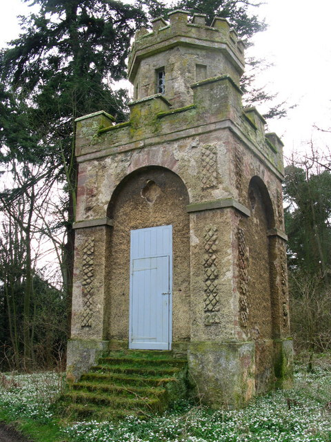 Saltoun Hall Doocot